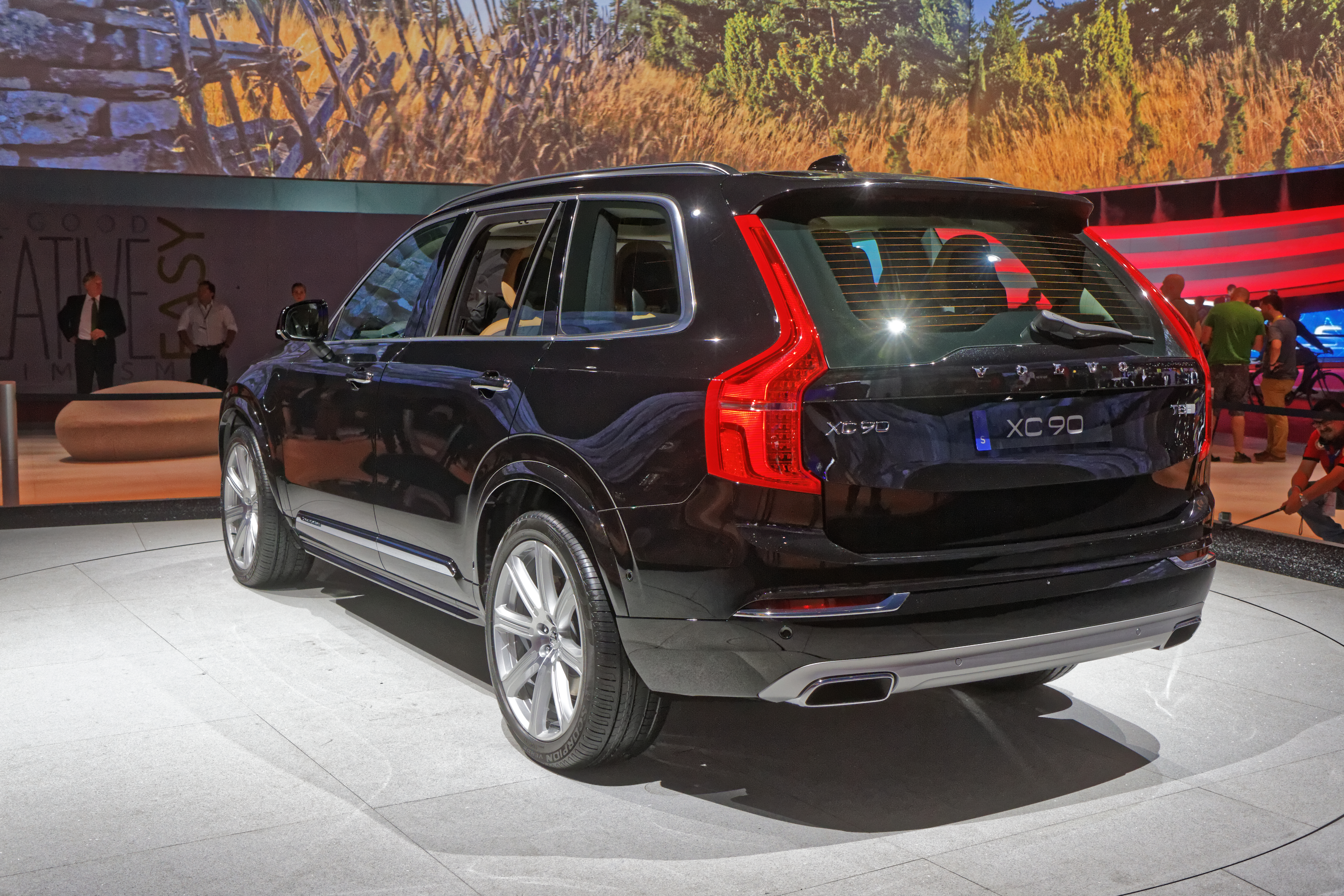 Une Volvo XC 90 présentée lors du mondial de l'automobile de Paris 2014.